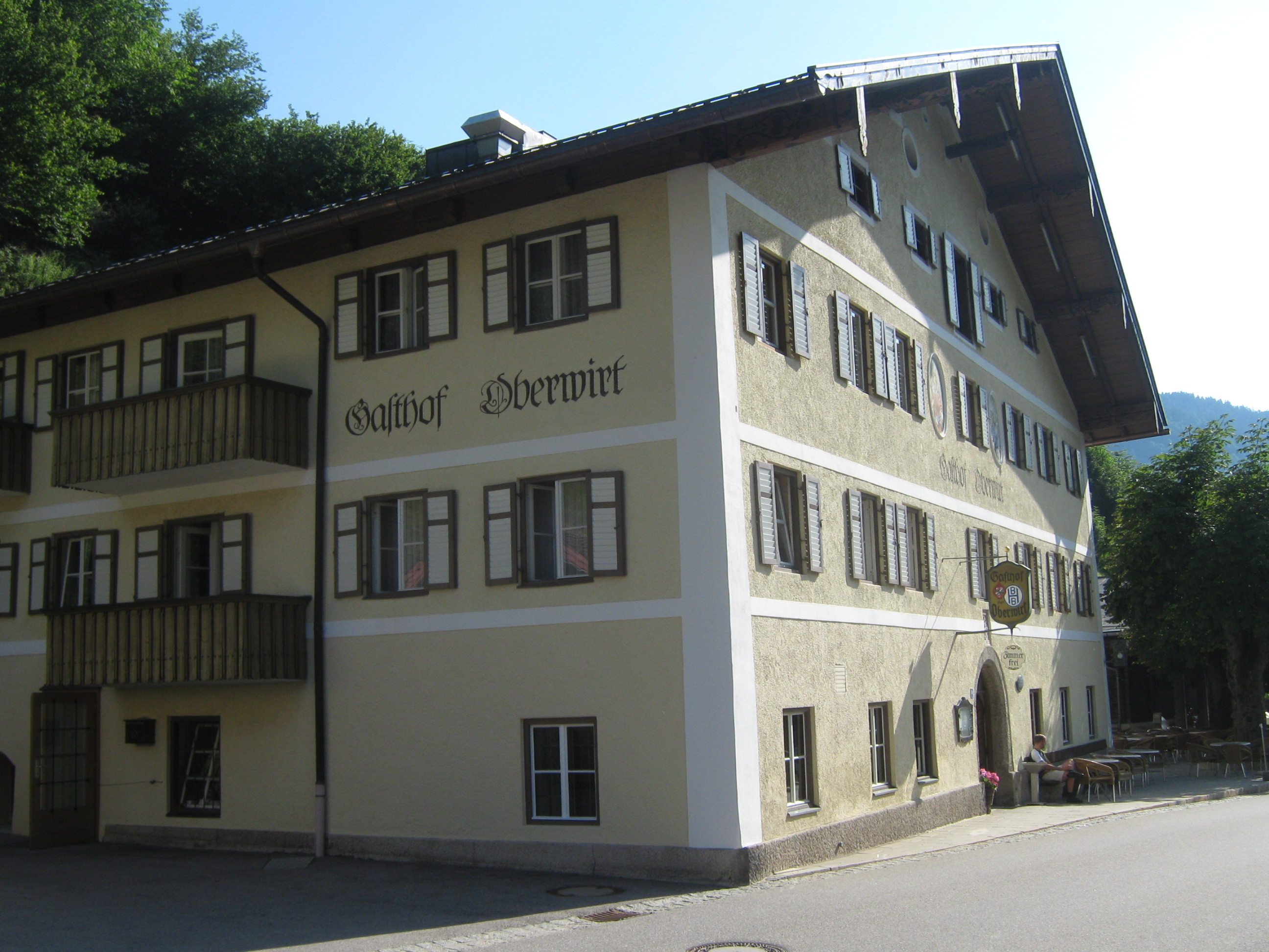 Oberwirt, Gnotschaft Taubensee, Ramsau bei Berchtesgaden, Oberbayern (Im Tal 86)